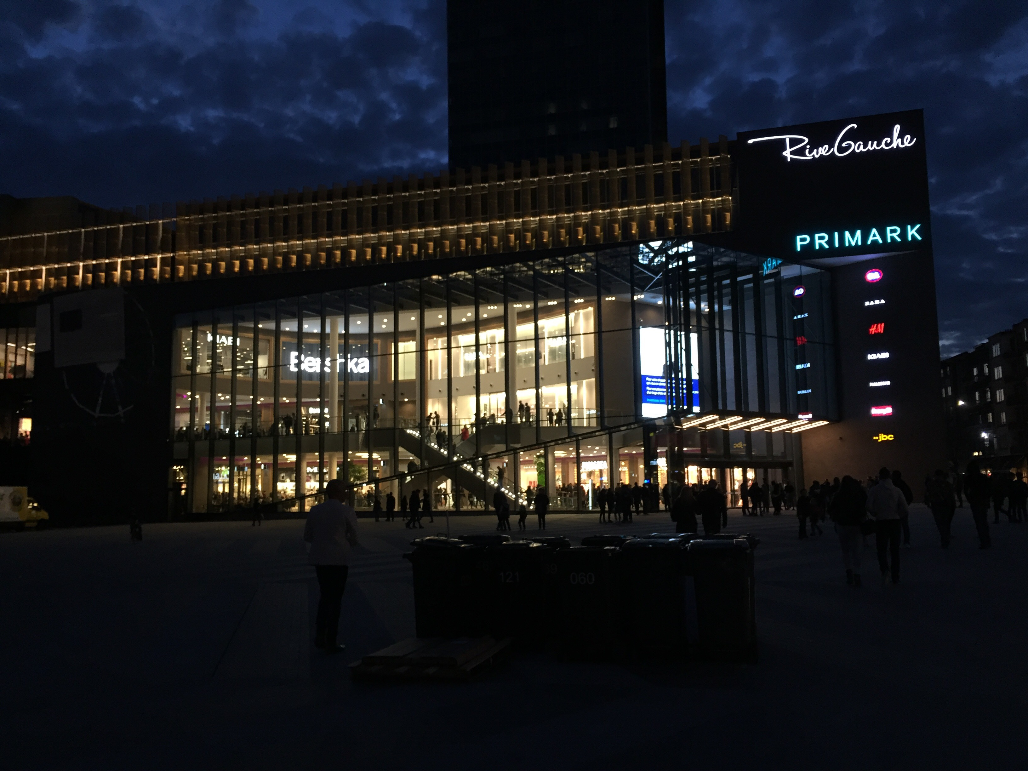 Centre commercial "Rive Gauche" de Charleroi - Vue depuis la Place Verte dans la soirée du 10 mars 2017 (2ème jour d'ouverture)